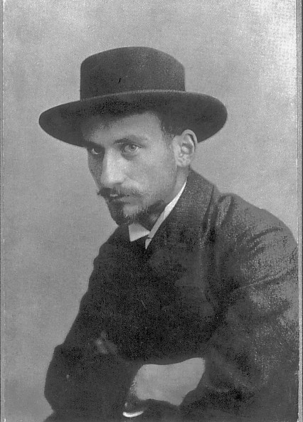 Wilhelm Groß (1883—1974)